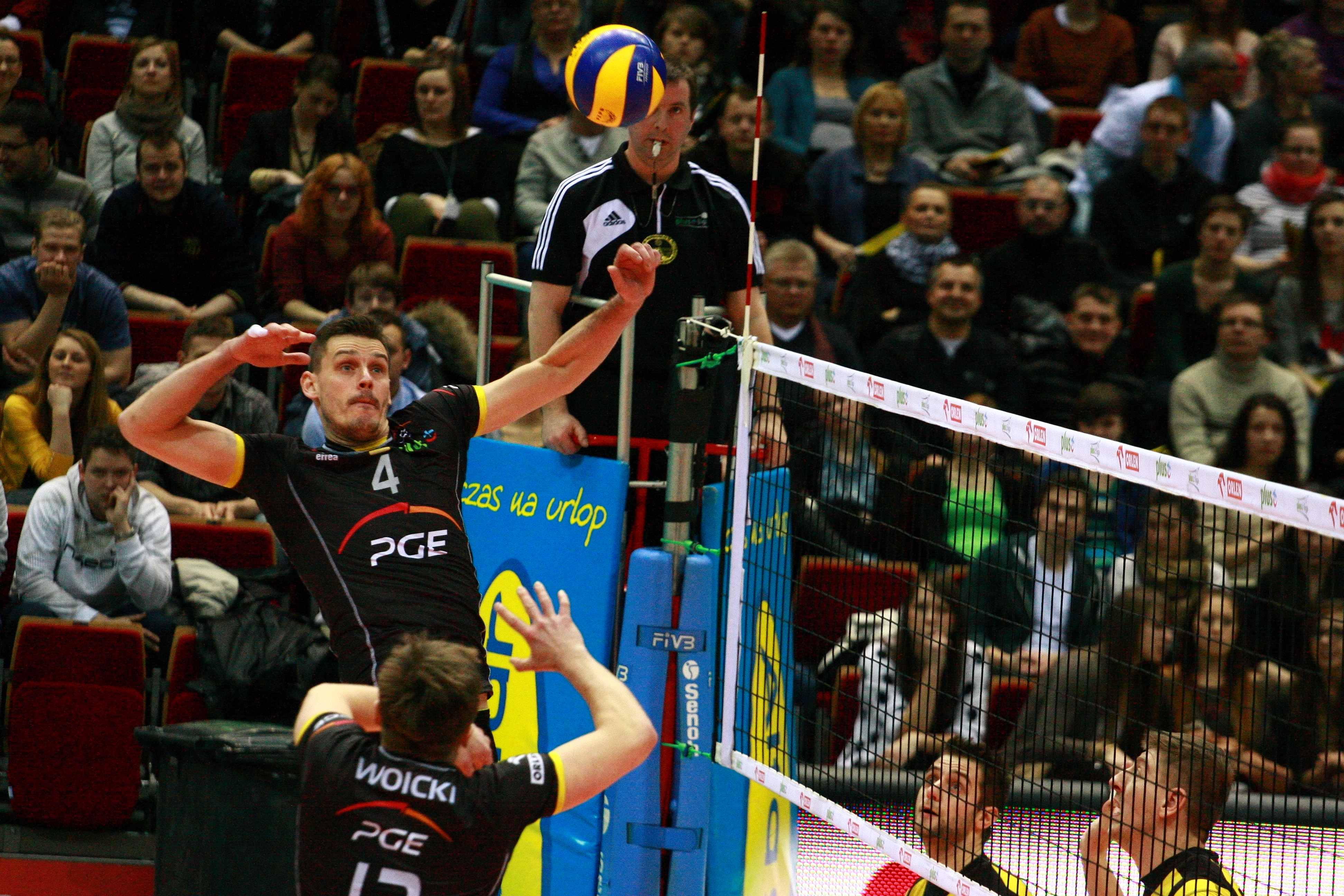 Lotos Trefl Gdańsk vs Skra Bełchatów